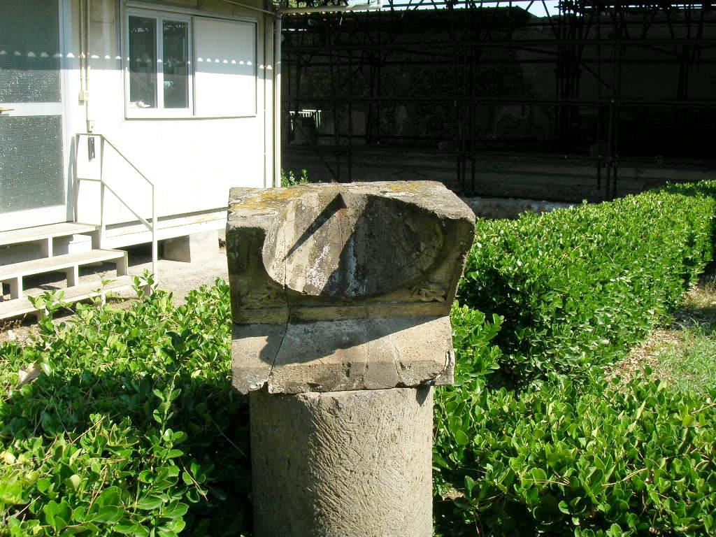 Gnomone (meridiana) della Villa San Marco a Stabia. Foto di user:Mentnafunangann, 15 agosto 2006.